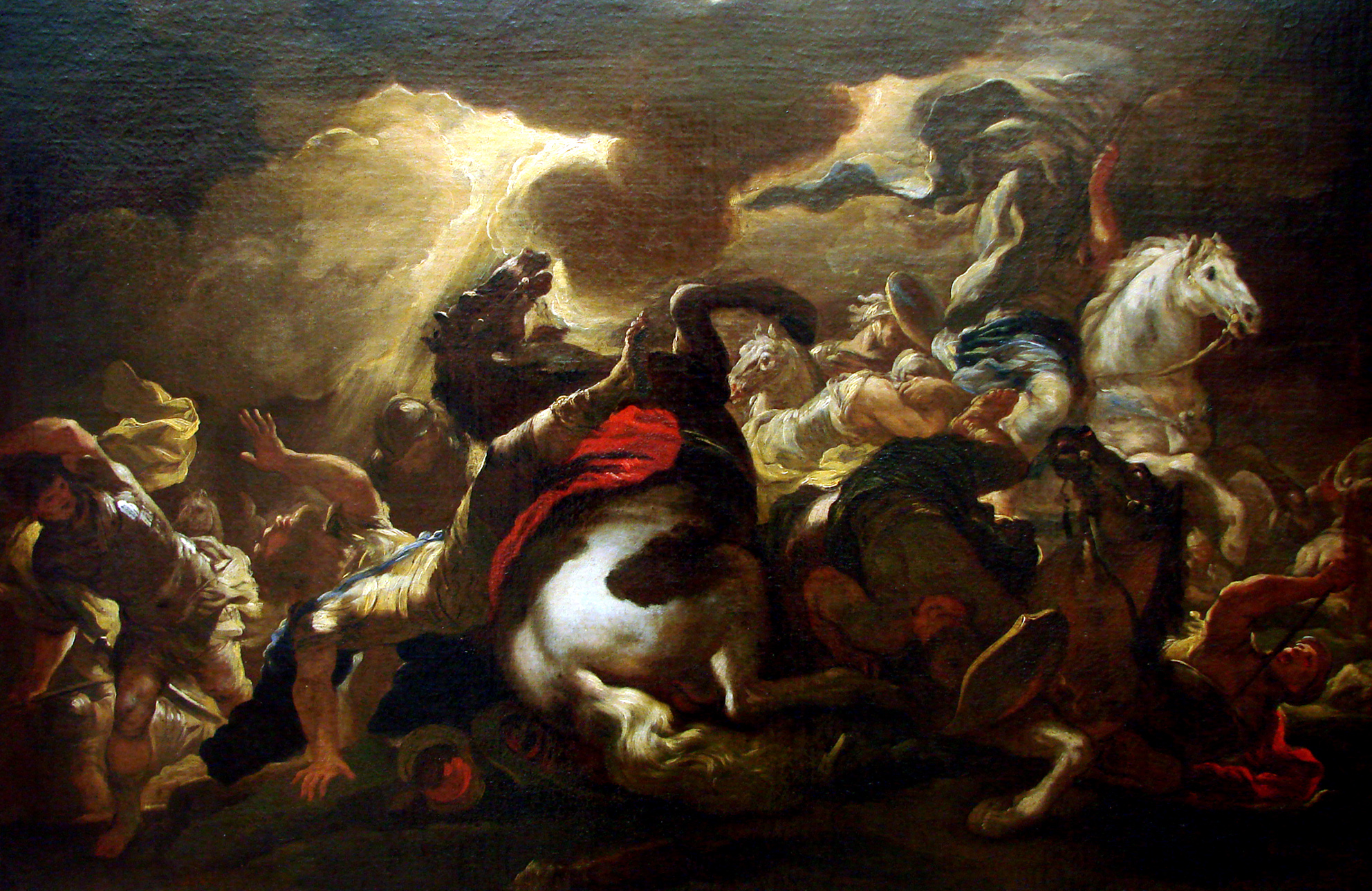 La conversion de Saint Paul (vers 1690), par Luca Giordano (Naples 1634 - Naples 1705).(Le haut du tableau a été supprimé sur la photo pour éviter un reflet.) Musée des Beaux-Arts de Nancy.